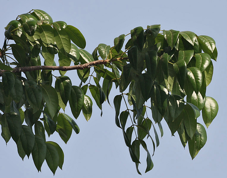 Spanish Mahogany Swietenia mahagoni in Kolkata, West Bengal, India.